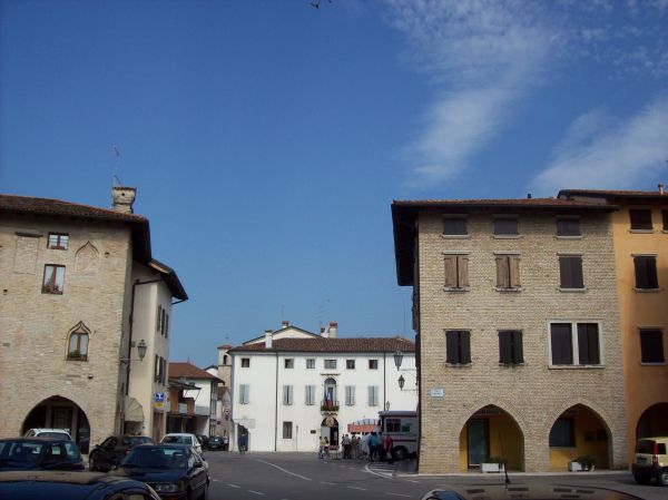 Valvasone (PN), Piazza Libertà col Municipio